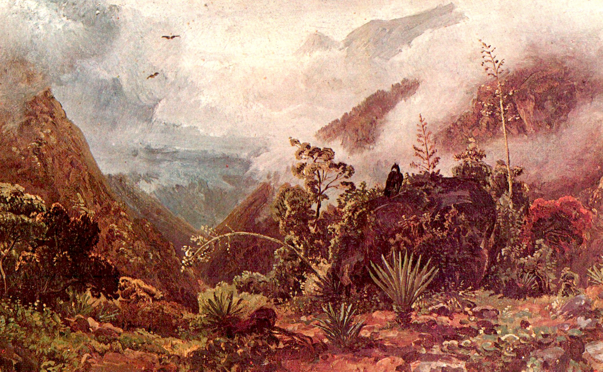 Paisaje cerca de Jaji, en los andes. Oleo sobre lienzo 16 x 25,9 cm. Asociacion Cultural Humboldt y Editorial el Arte.